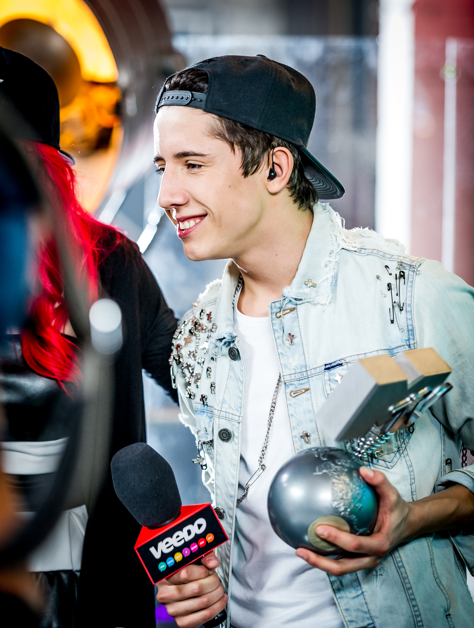 Dawid Kwiatkowski na MTV Europe Music Awards Pre-Party 2013